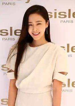 배우 홍수현이 20일 오후 서울 중구 신라호텔에서 열린 '시슬리-시슬리아 랭테그랄 앙티 아쥬 아이 앤 립 콘투어 크림' 런칭 행사에 참석해 포즈를 취하고 있다.